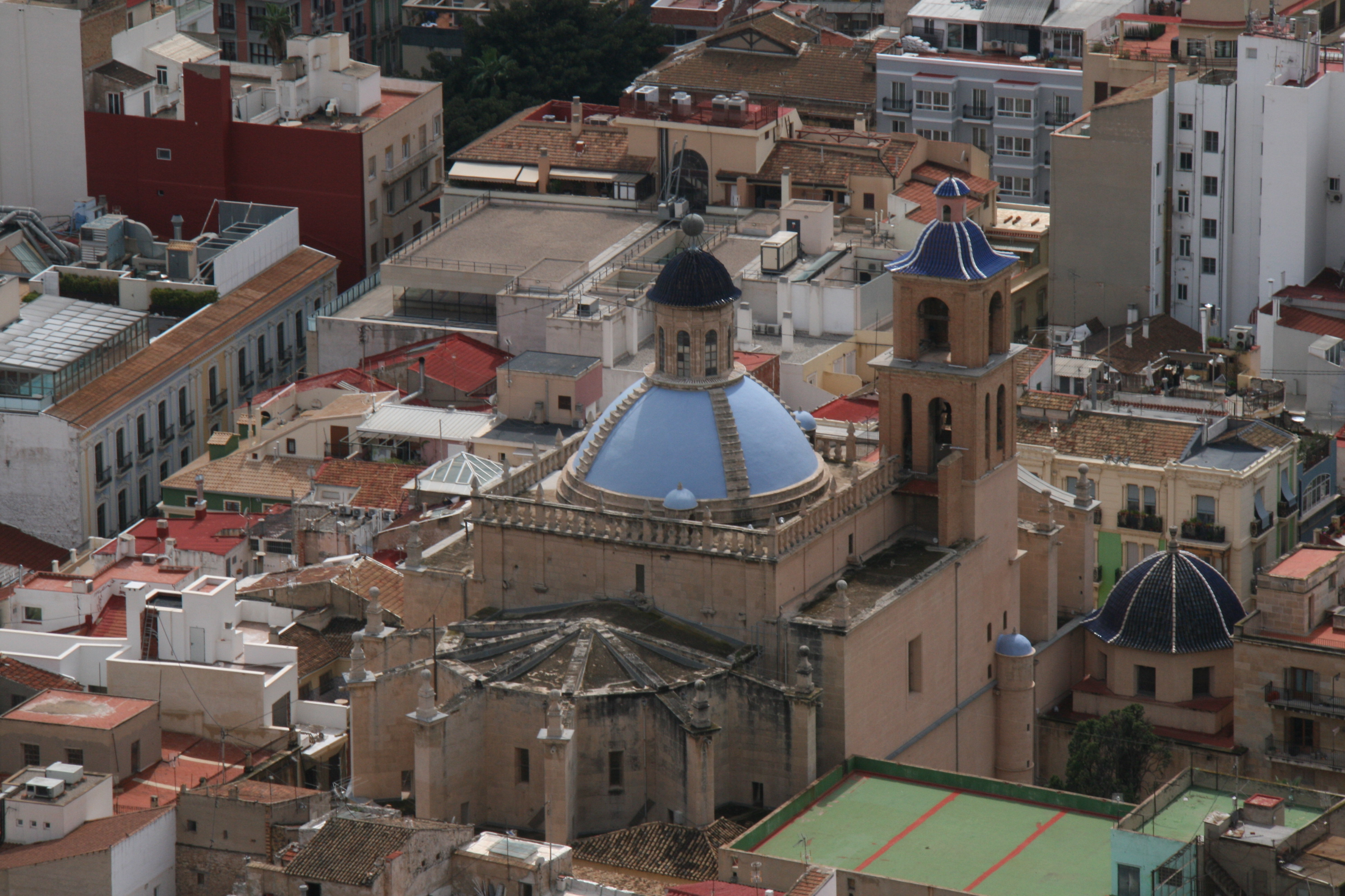 Vista de la Iglesia de San Nicolás (Alicante)